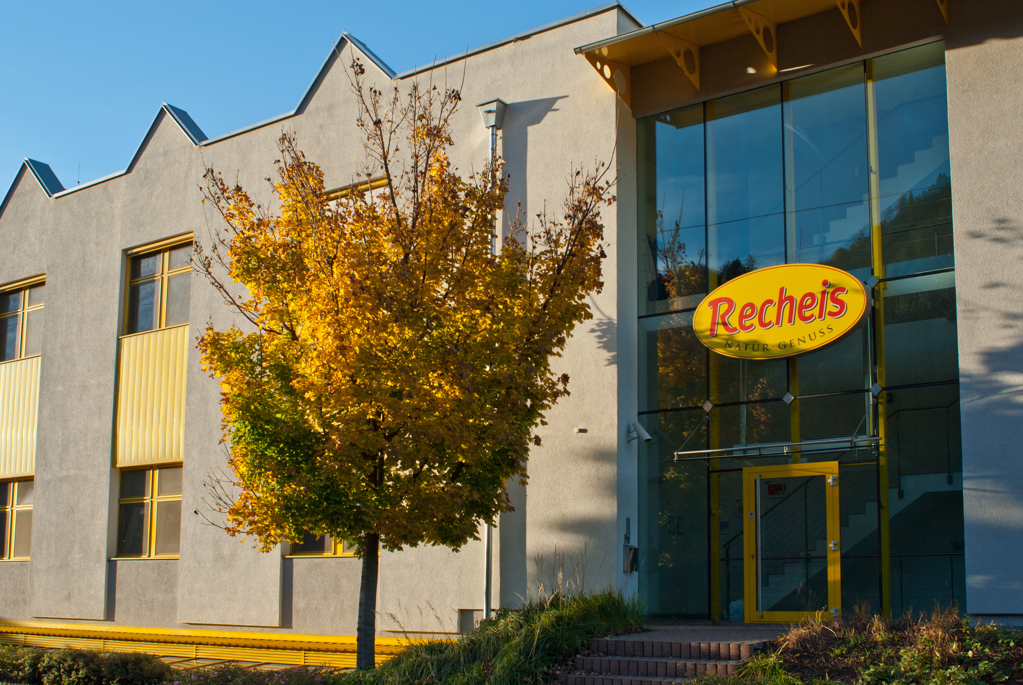 Das 2004 erbaute neue Recheis-Gebäude an der Lend in Hall in Tirol